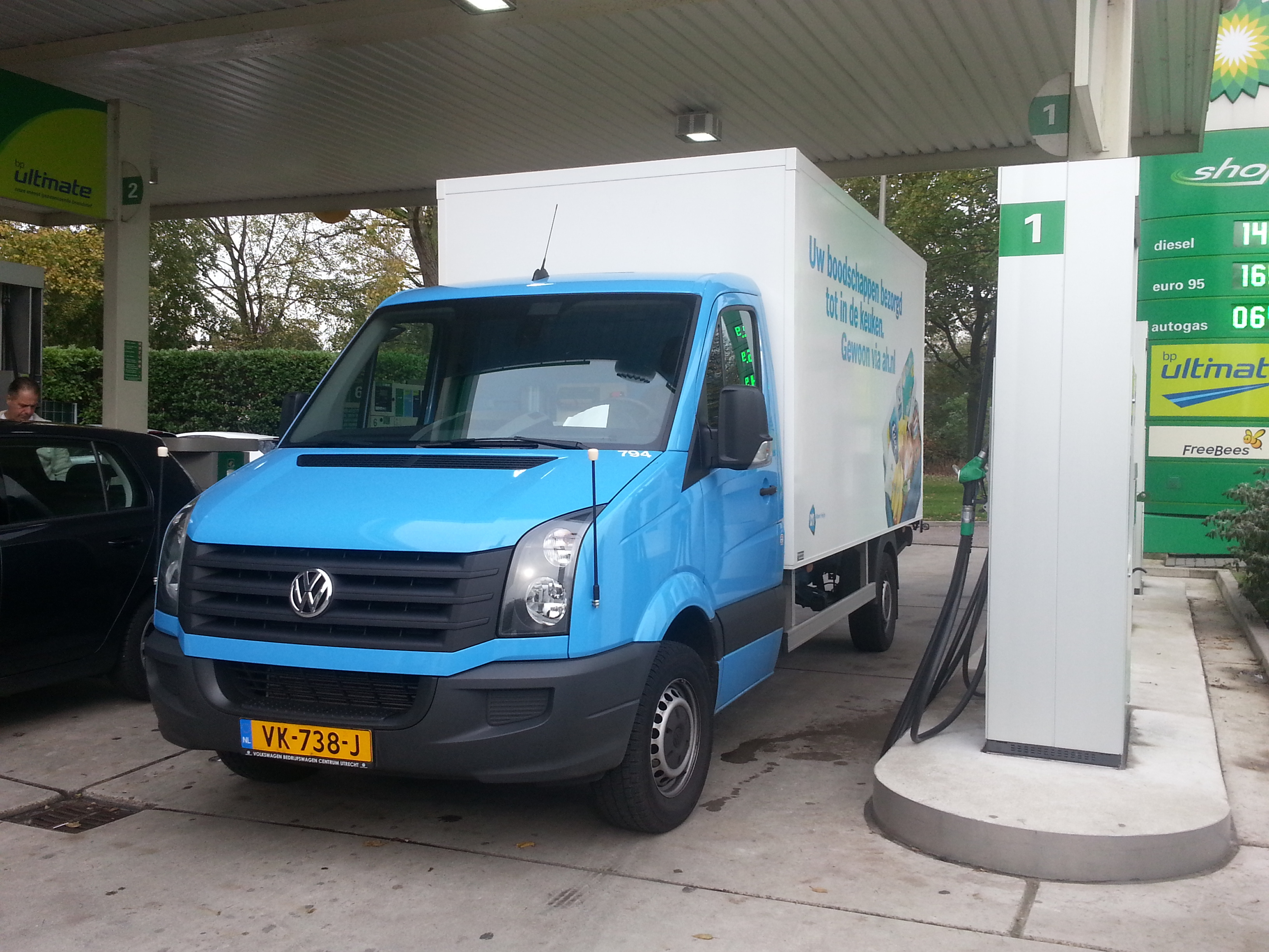 Een Volkswagen Crafter van Albert.nl in de nieuwe, blauwe Albert Heijn-kleuren bij een tankstation De Meern.